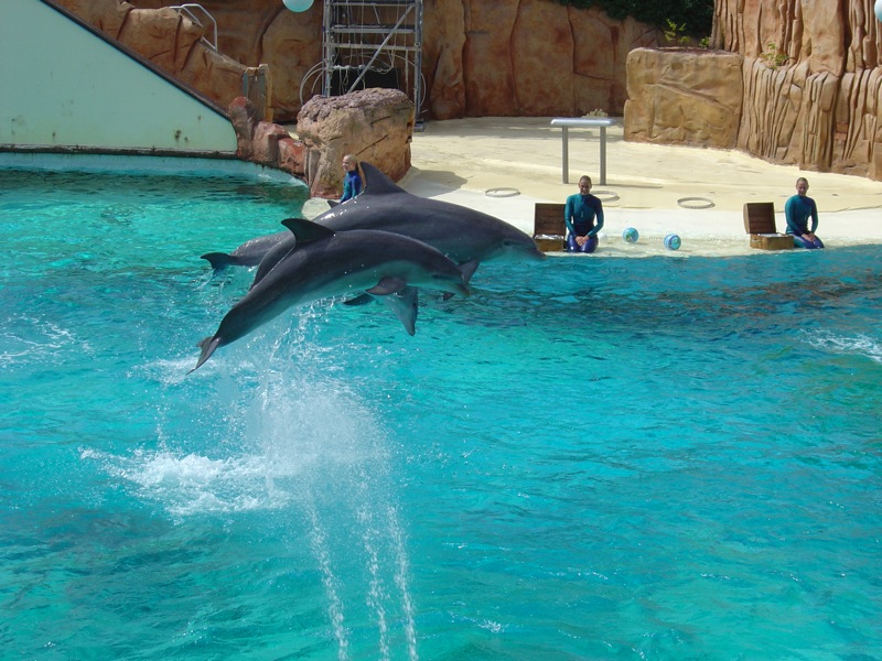 Parc Astérix, France